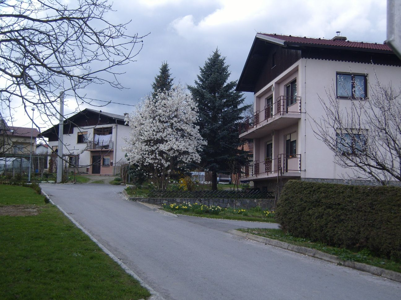 Der Frühling ist hier schon ein wenig fortgeschrittener als bei uns